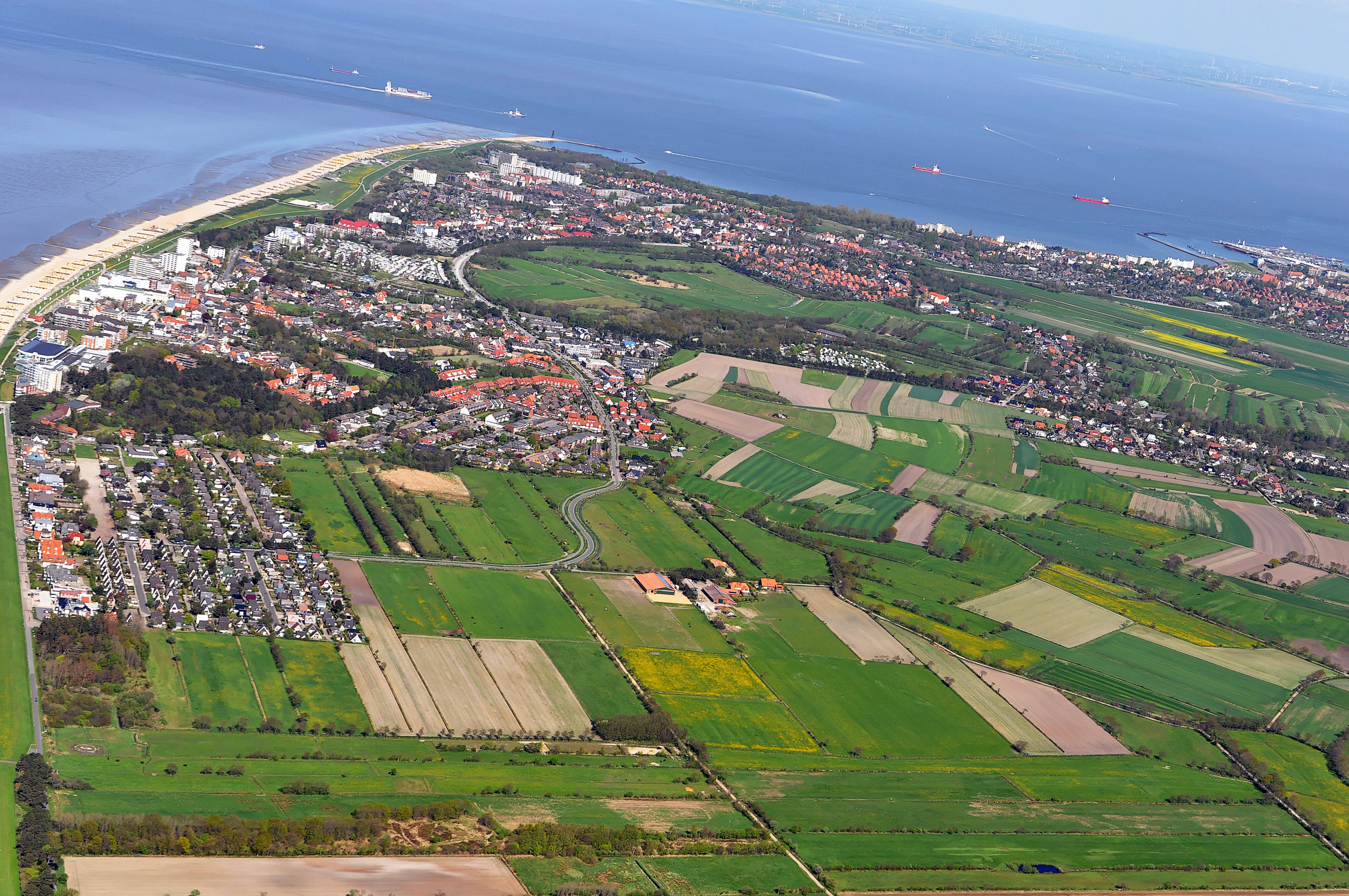 Luftbilder von der Nordseeküste 2012-04 Dieses Foto entstand aufgrund eines Projektes, das von Wikimedia Deutschland e. V. gefördert wurde. Im Rahmen des „Community-Projektbudgets“ sollen Luftbilder u.a. von Inseln, Halligen, Sanden und Küstenstädten der deutschen Nordseeküste angefertigt werden. Das Projekt „Fotoflüge“ wurde im September 2011 begonnen.